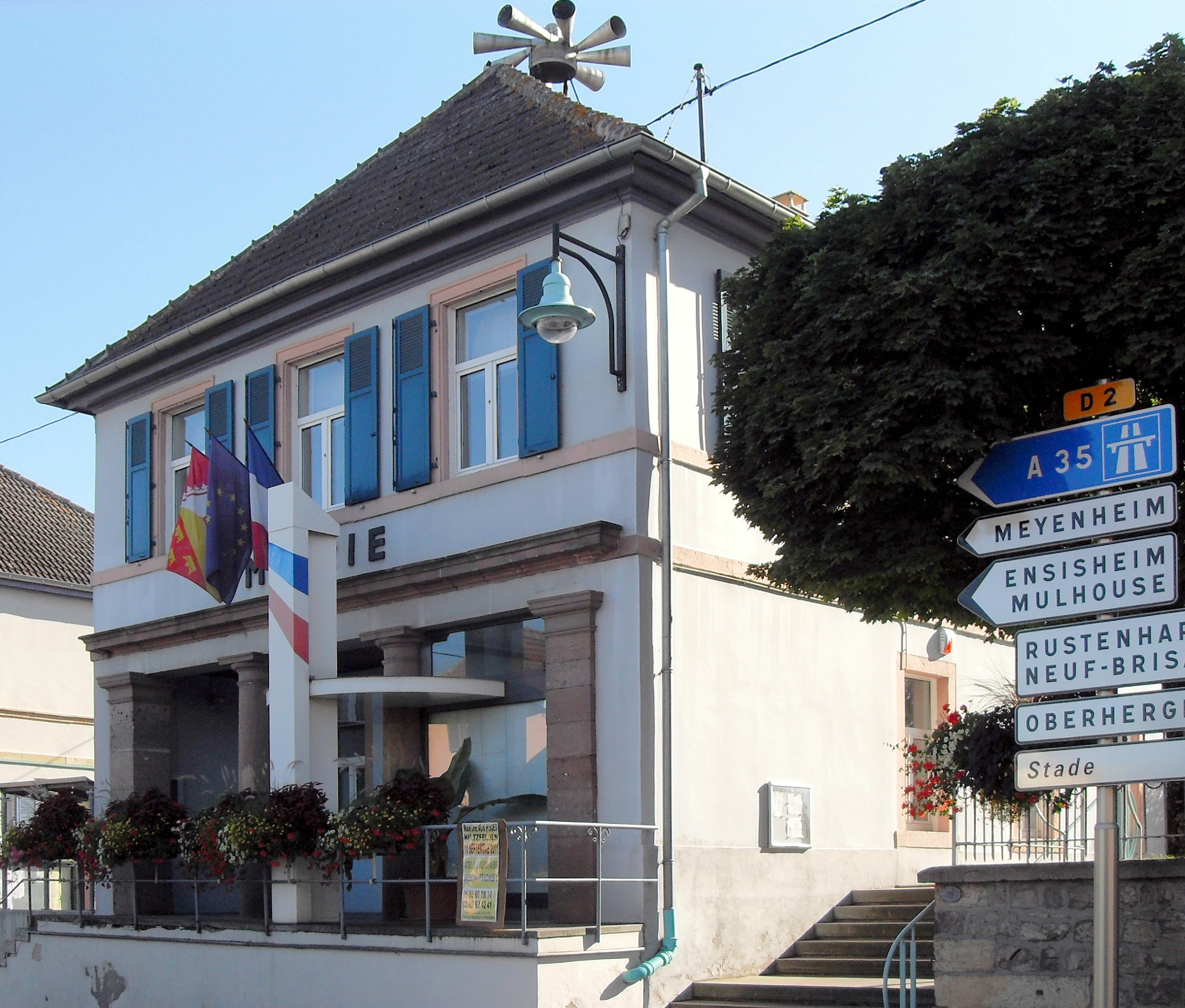 La mairie à Hirtzfelden